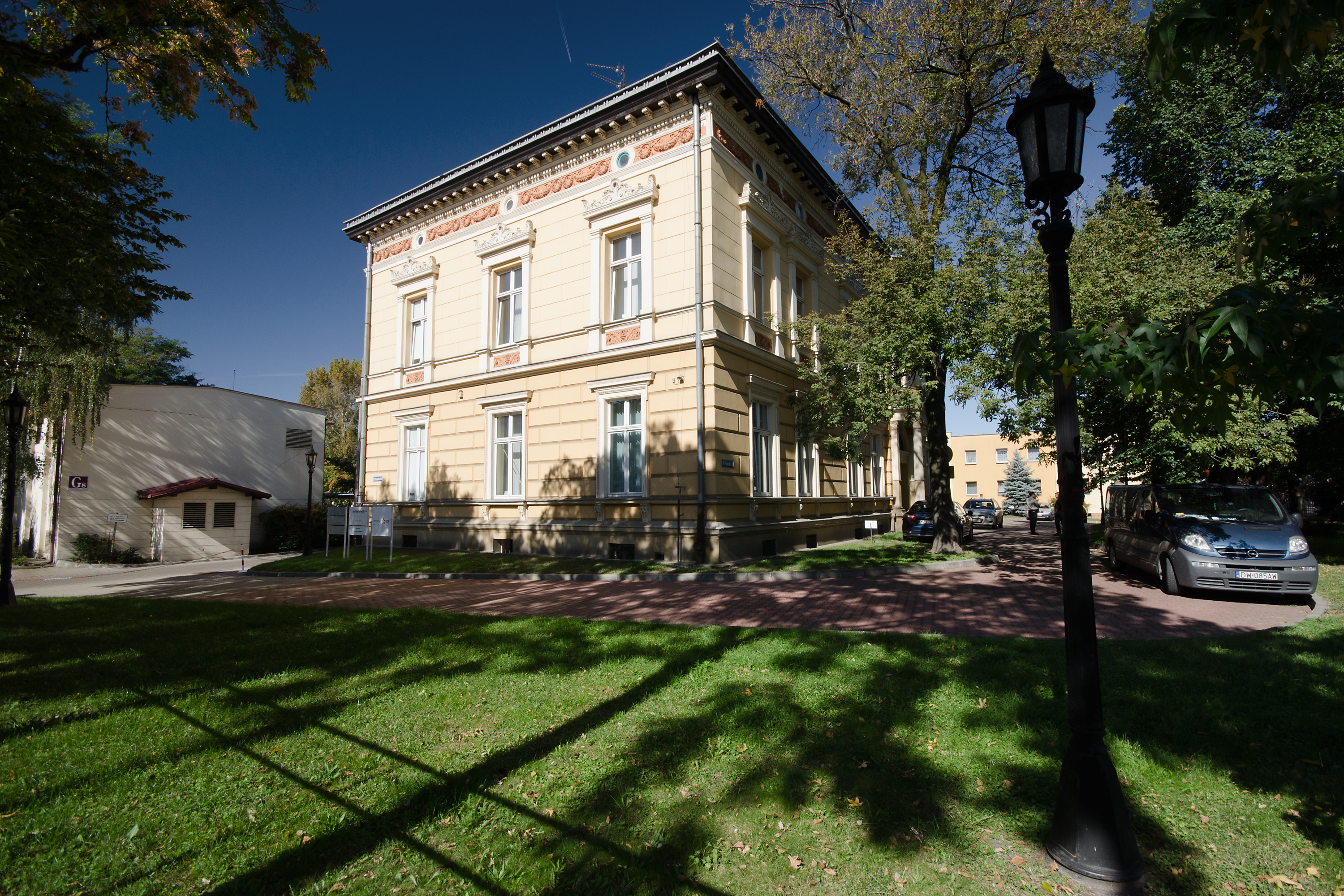 Willa pl. Staszica 30, Miasto Wrocław - Śródmieście